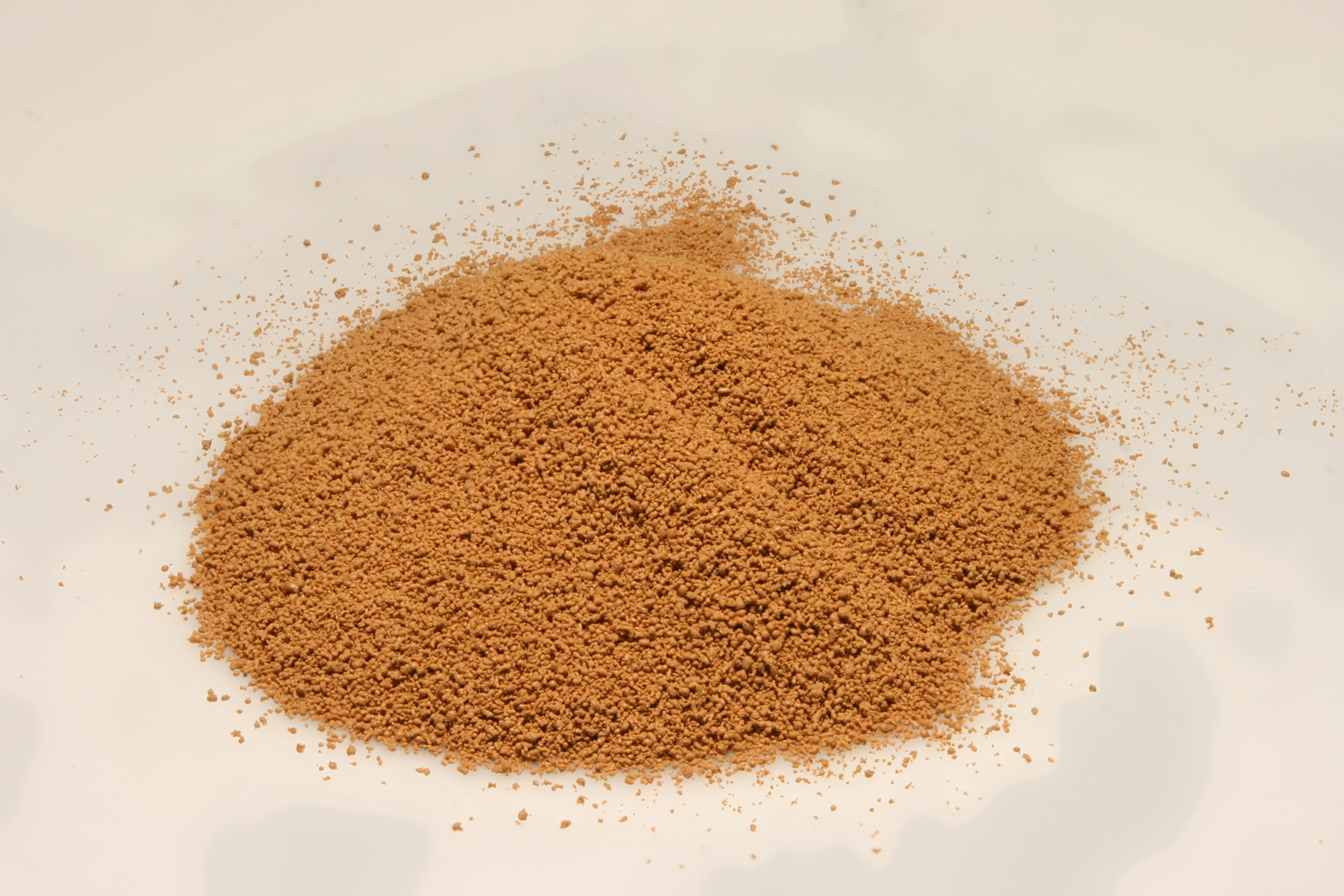 Kaffeepulver